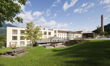 Bild der Privaten Universität im Fürstentum Liechtenstein